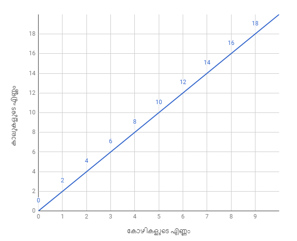 കോഴികളുടെ എണ്ണത്തെയും അവയുടെ കാലുകളുടെ എണ്ണത്തെയും തമ്മിൽ ബന്ധിപ്പിയ്ക്കുന്ന രേഖീയസമവാക്യത്തിന്റെ ആരേഖം